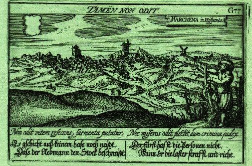 Grabado